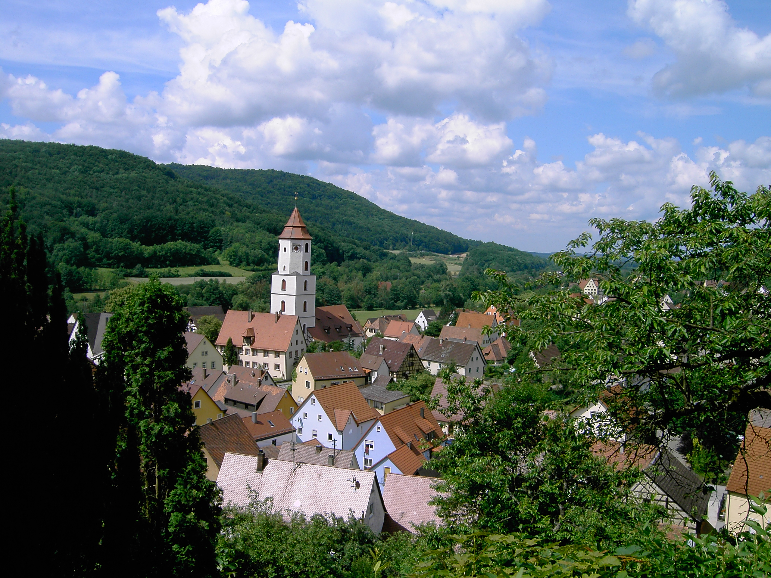 Pommelsbrunn. Dorf in Deutschland, Bayern, Mittelfranken